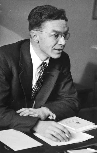 portrett, mann, sosialøkonom, forskningssjef, sittende halvfigur ved skrivebord.